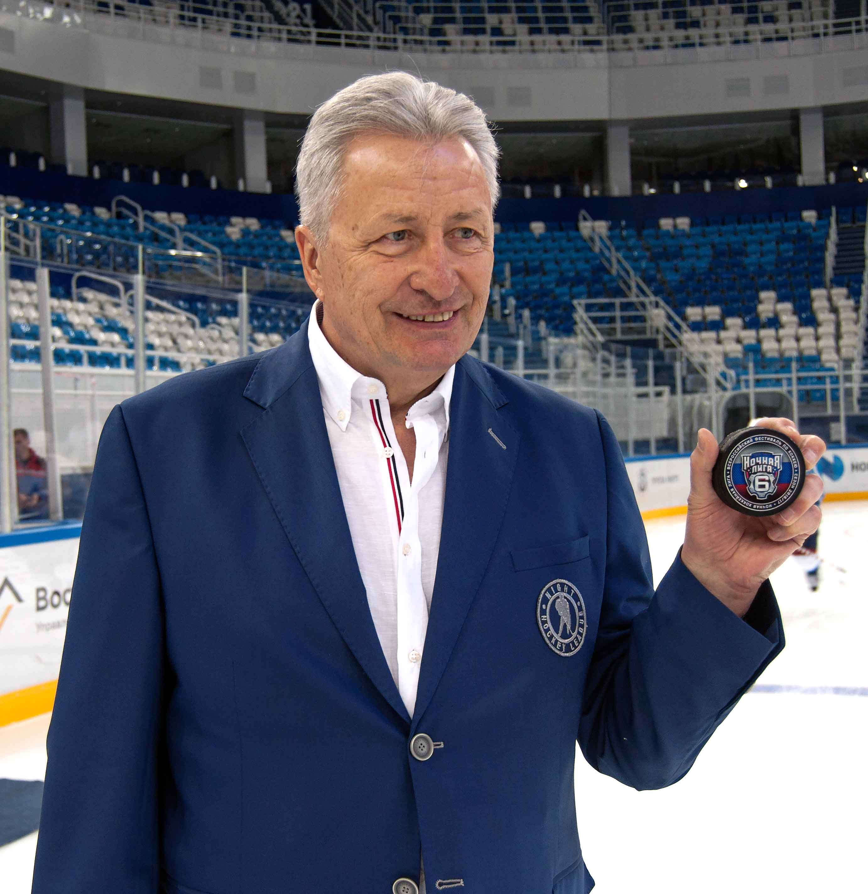 Открытие VI фестиваля Ночной Хоккейной Лиги